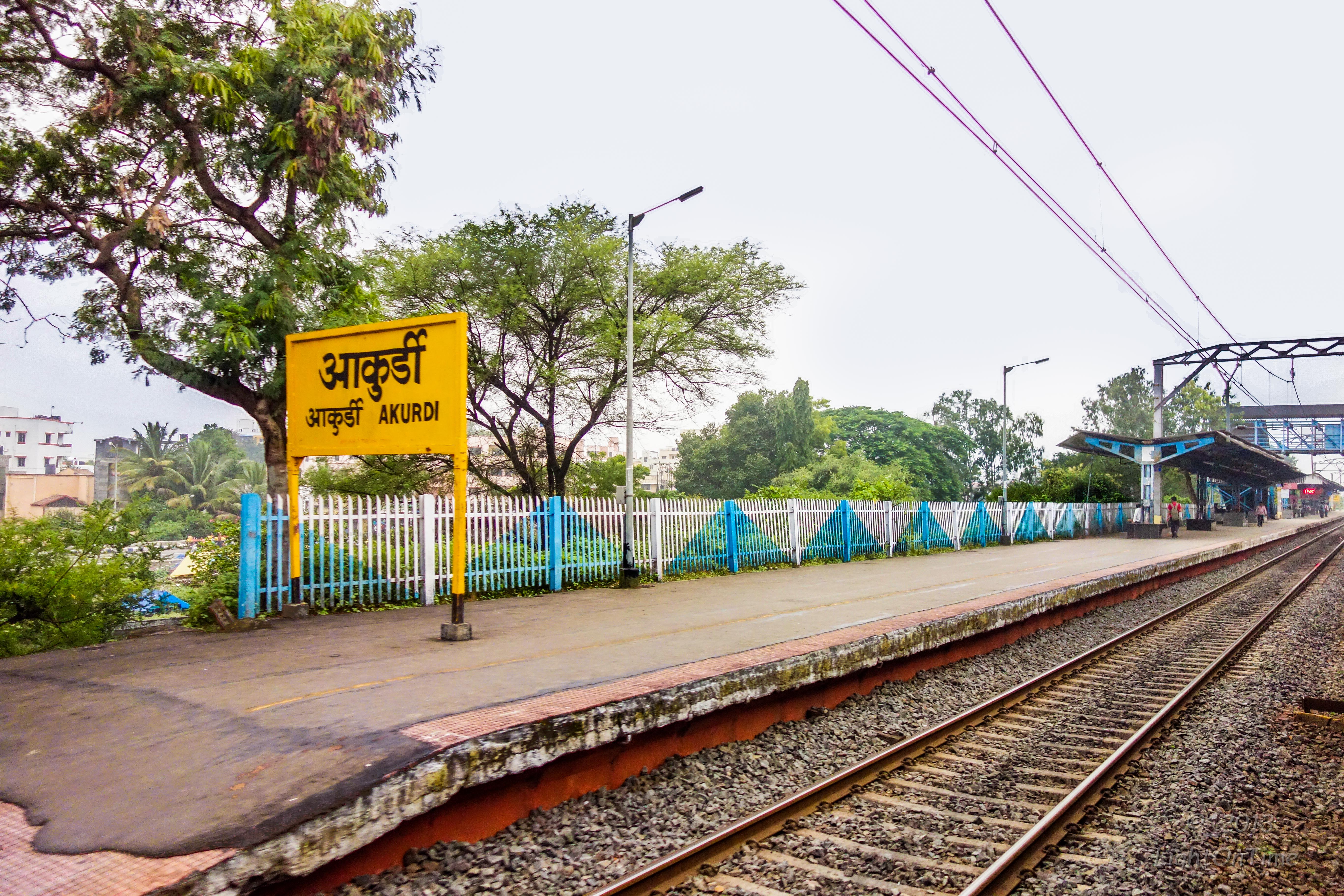 Pradhikaran, Nigdi, Pimpri-Chinchwad, Maharashtra 411044, India